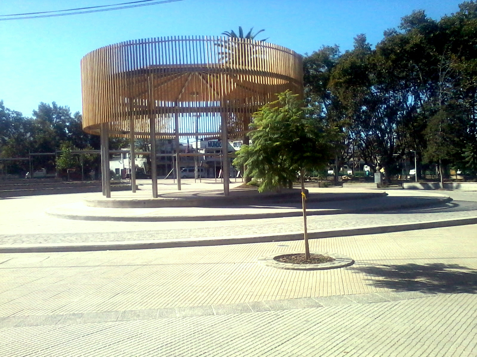 Plaza central de Colina.